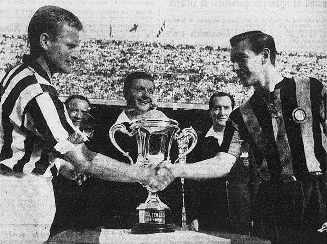 Milano, stadio San Siro, 13 settembre 1959. I due capitani di Juventus e Inter, rispettivamente Giampiero Boniperti (a sinistra) e Antonio Angelillo (a destra), si stringono la mano sotto gli occhi dell'arbitro Cesare Jonni (al centro), prima della finale di Coppa Italia 1958-59 vinta dal club bianconero.